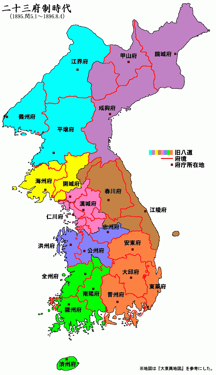 朝鲜地图 朝鲜二十三府图.gif